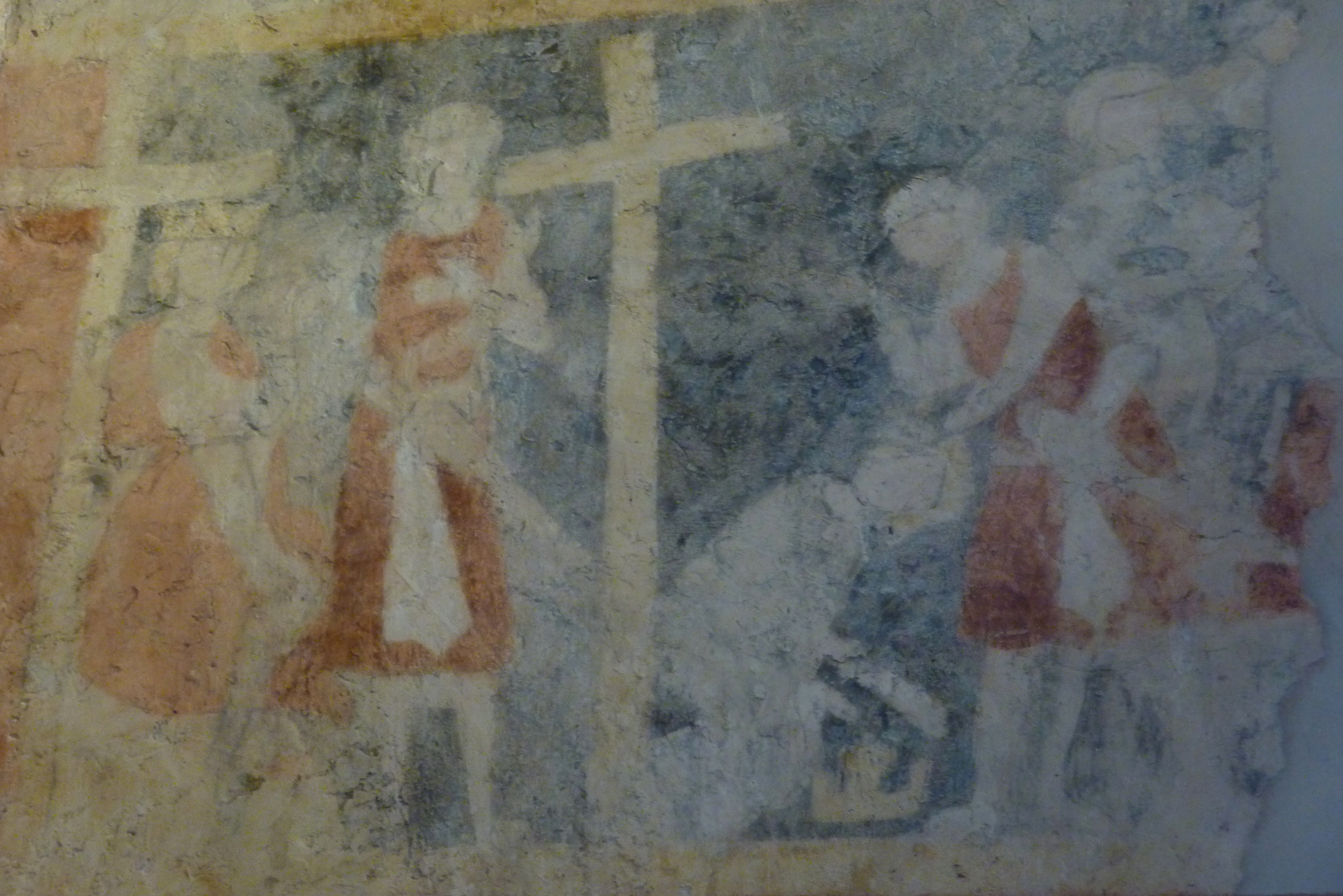 Evangelische Kirche in Fraurombach, einem Stadtteil von Schlitz im Vogelsbergkreis (Hessen), gotische Wandmalerei aus der ersten Hälfte des 14. Jahrhunderts, Darstellung: Szene des Herakliuszyklus